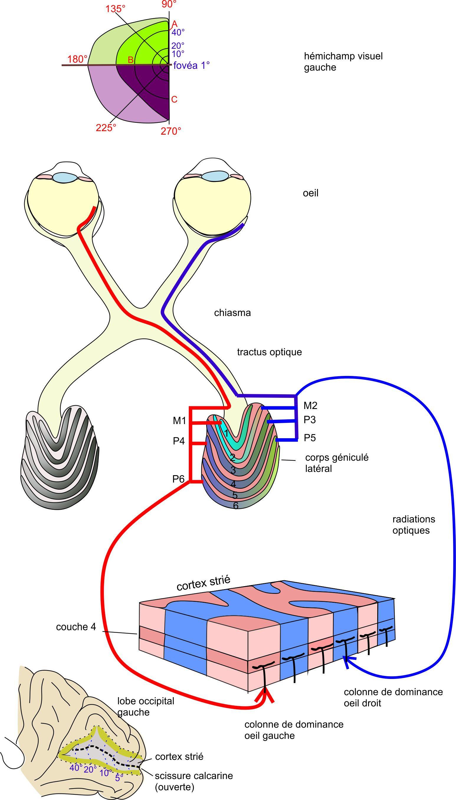 Projections rétine-CGL-cortex strié, illustrant la ségrégation de l'oeil gauche et droit